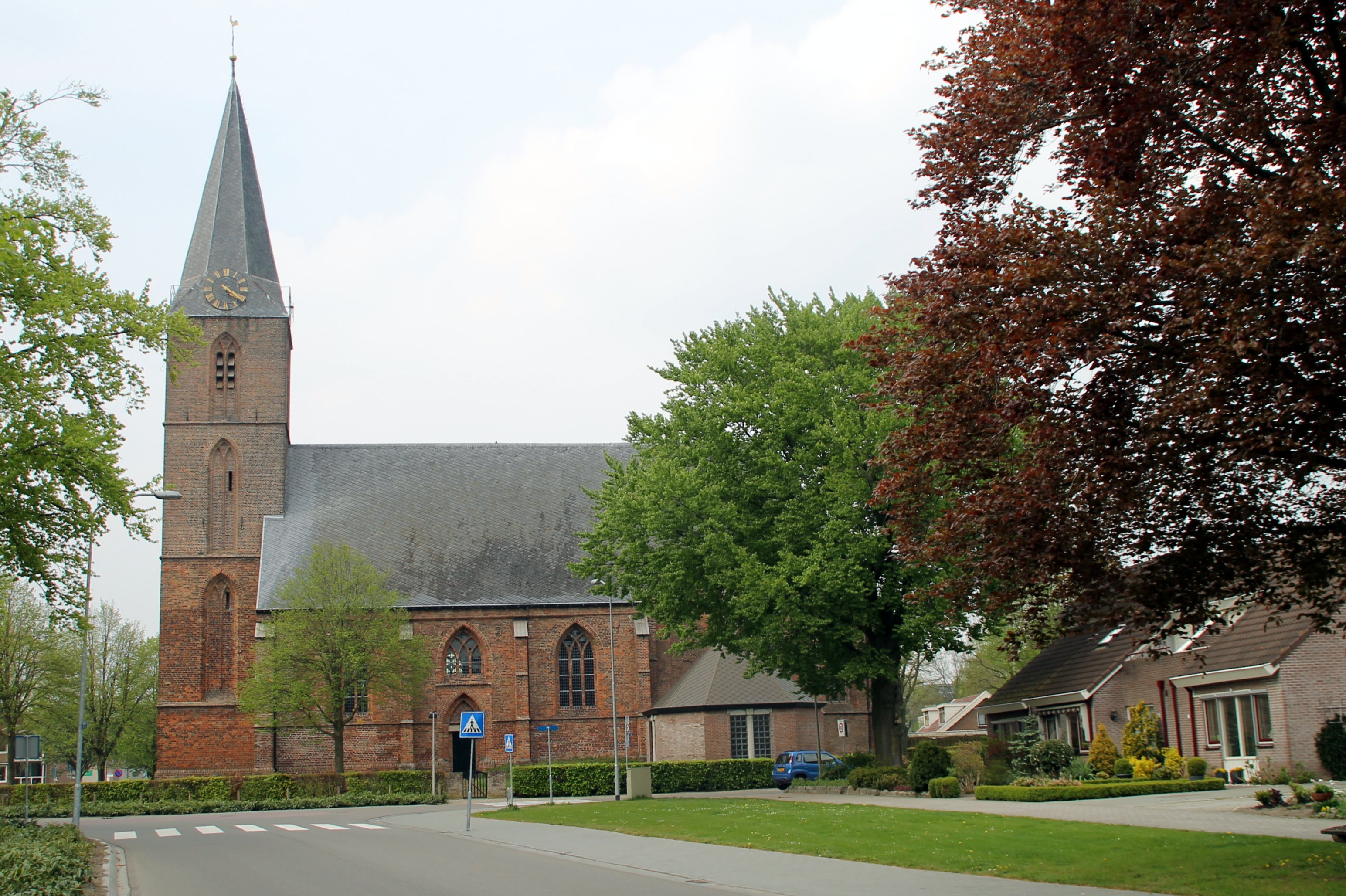 Beilen, Prins Bernhardstraat 12 - Stephanus